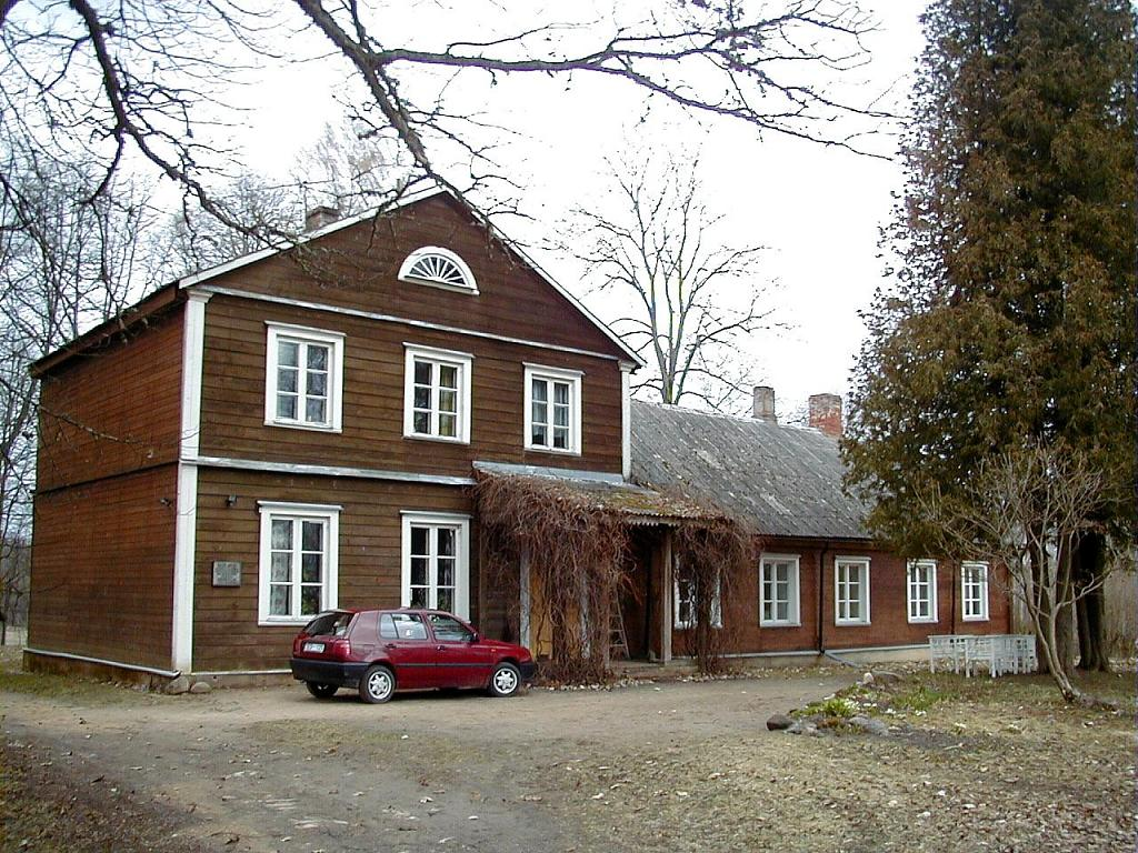 Drieliņu muiža 2003-05-01